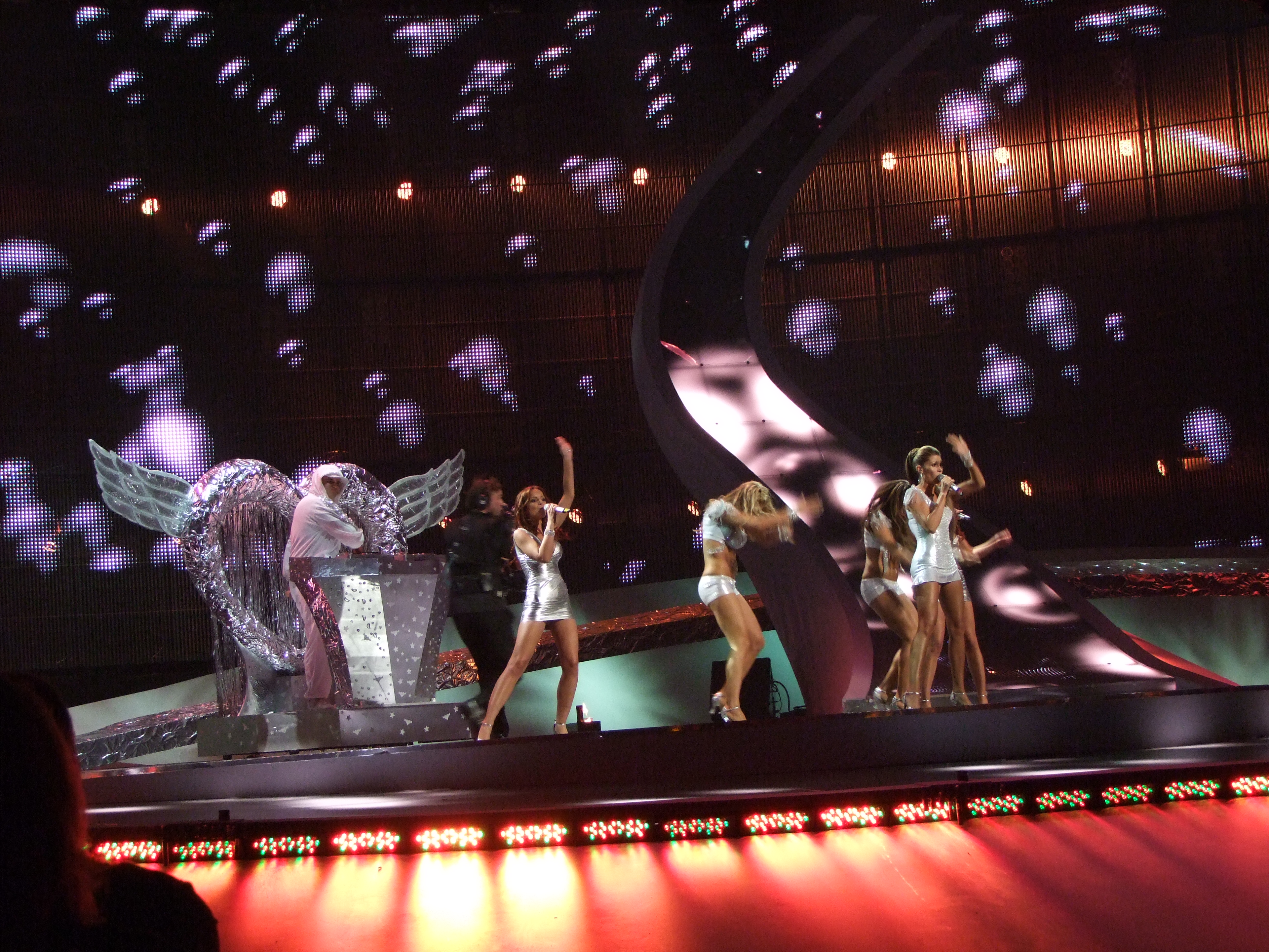 Semifinal 2 Eurovision 2008